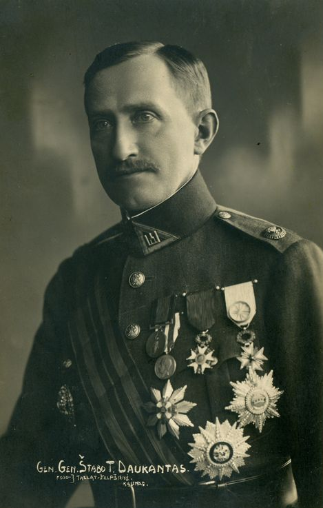 General Teodoras Daukantas (1884-1960)